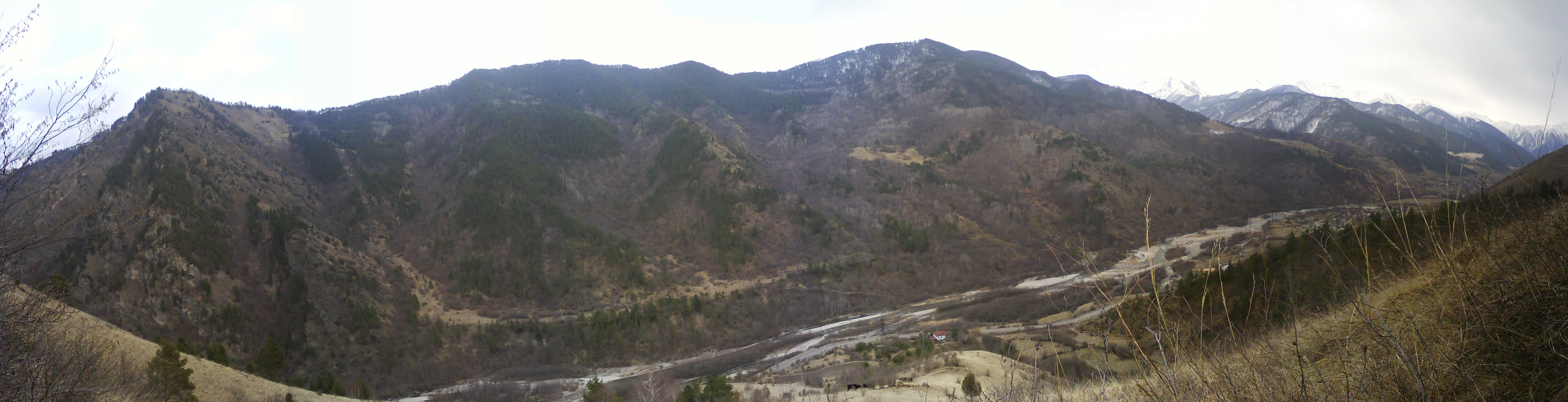 Панорама с горы на пос. Эльбрусский